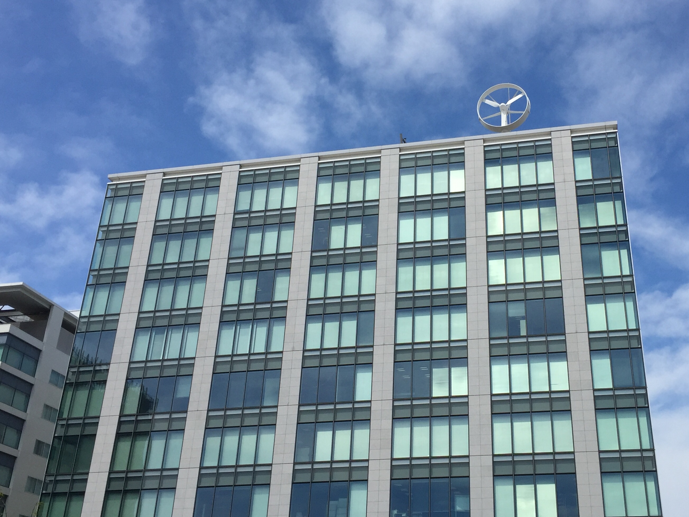 みなとみらい地区33街区のオフィスビル「MMパークビル」。屋上には小型風力発電機が設置されている。